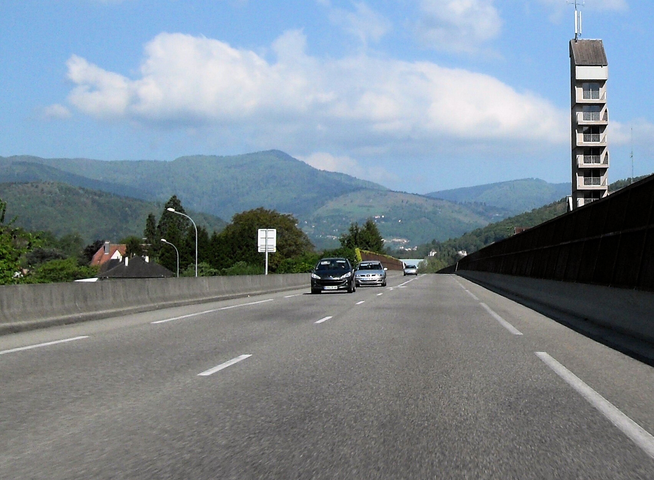 E 512, L'ancienne RN 66 à Saint-Amarin